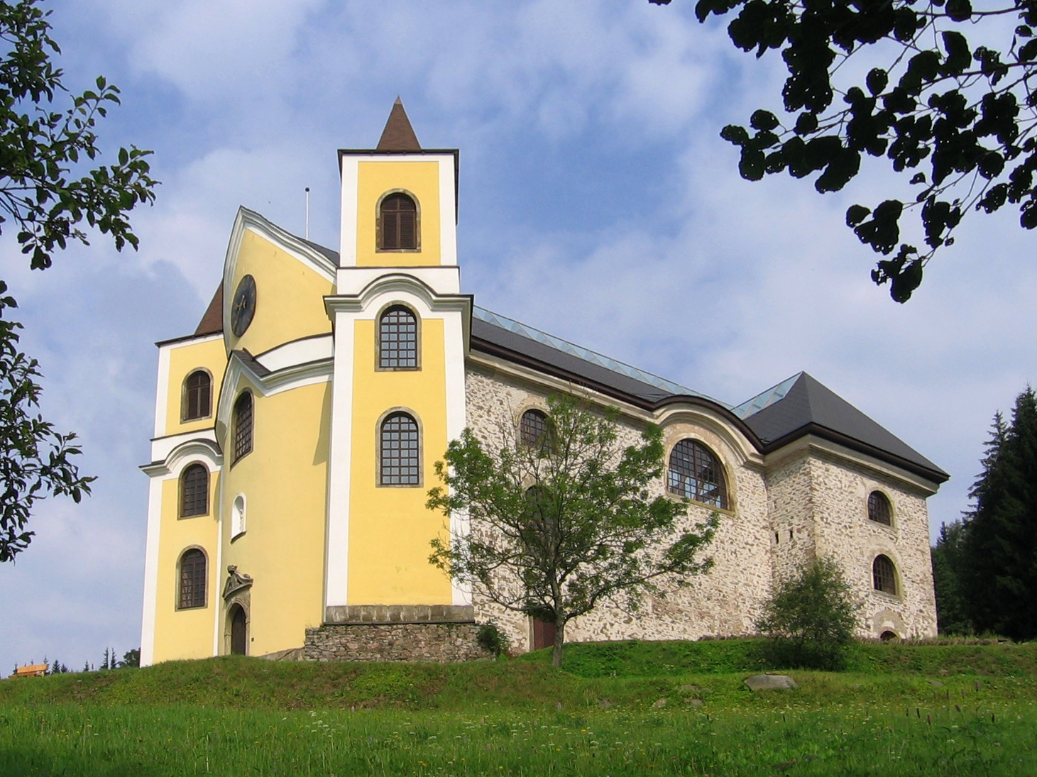 Kostel Nanebevzetí Panny Marie, Neratov v Orlických horách.